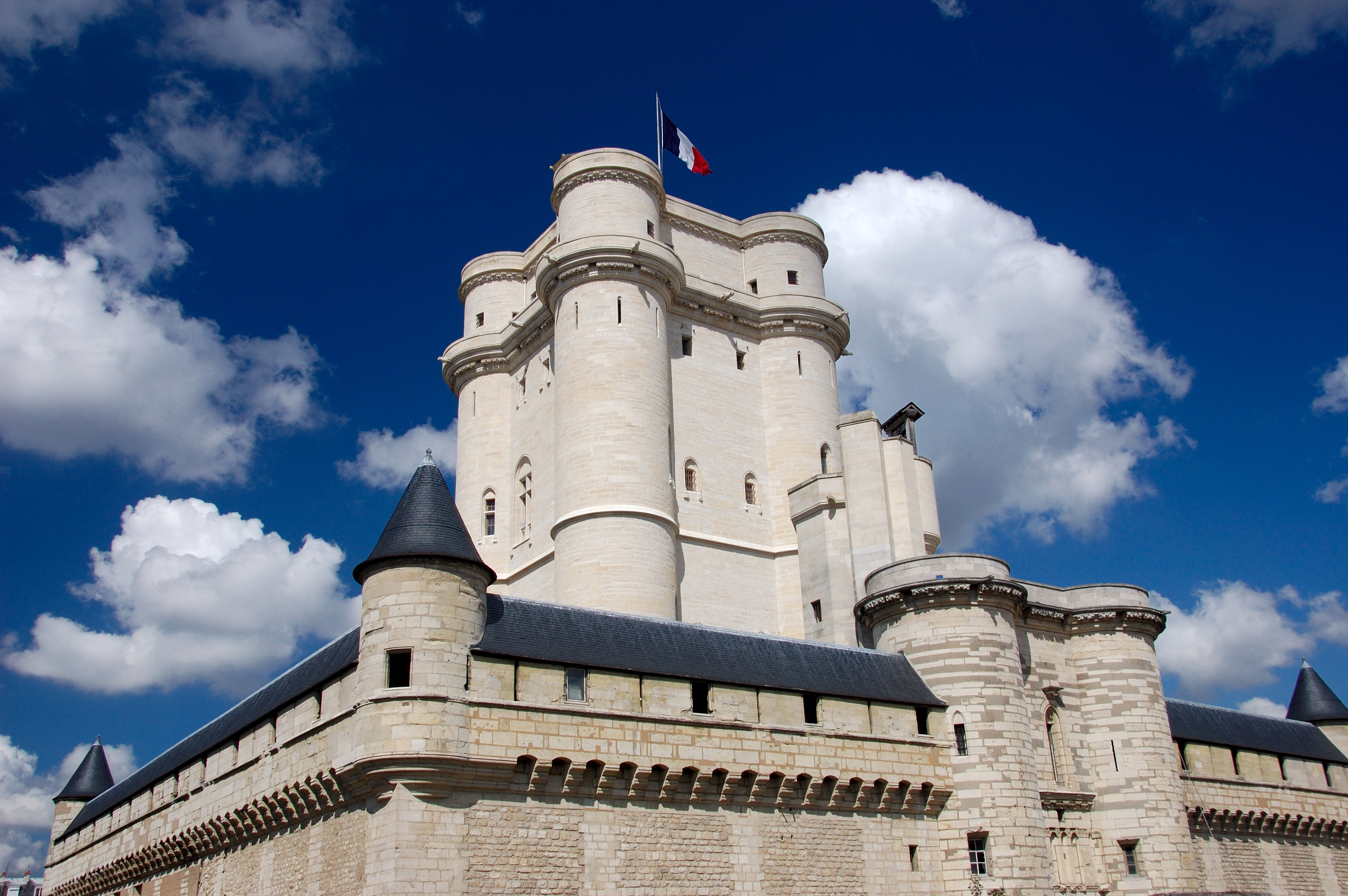 Donjon du Château de Vincennes, photo prise du sud-est de la tour./Château de Vincennes keep, picture taken from the south-east corner of the moat.